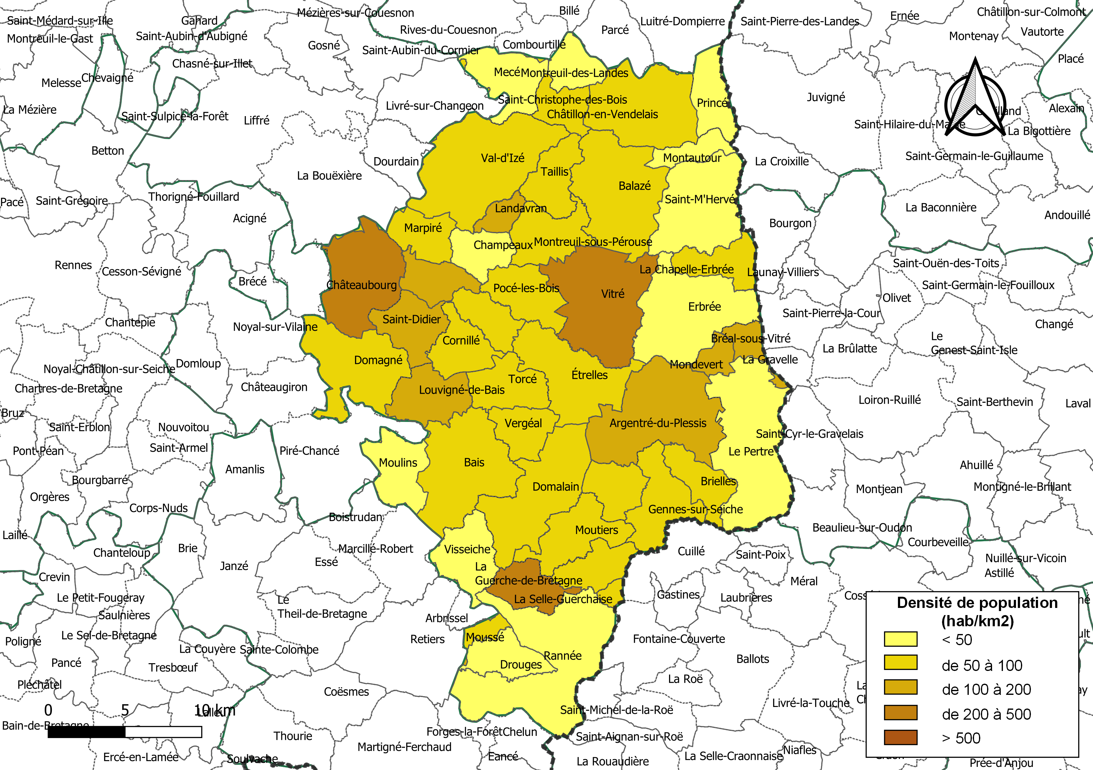 Carte des densités de population (millésimée 2016) des communes de l'intercommunalité Vitré Communauté, département d'Ille-et-Vilaine, France. Composition au 1er janvier 2019.